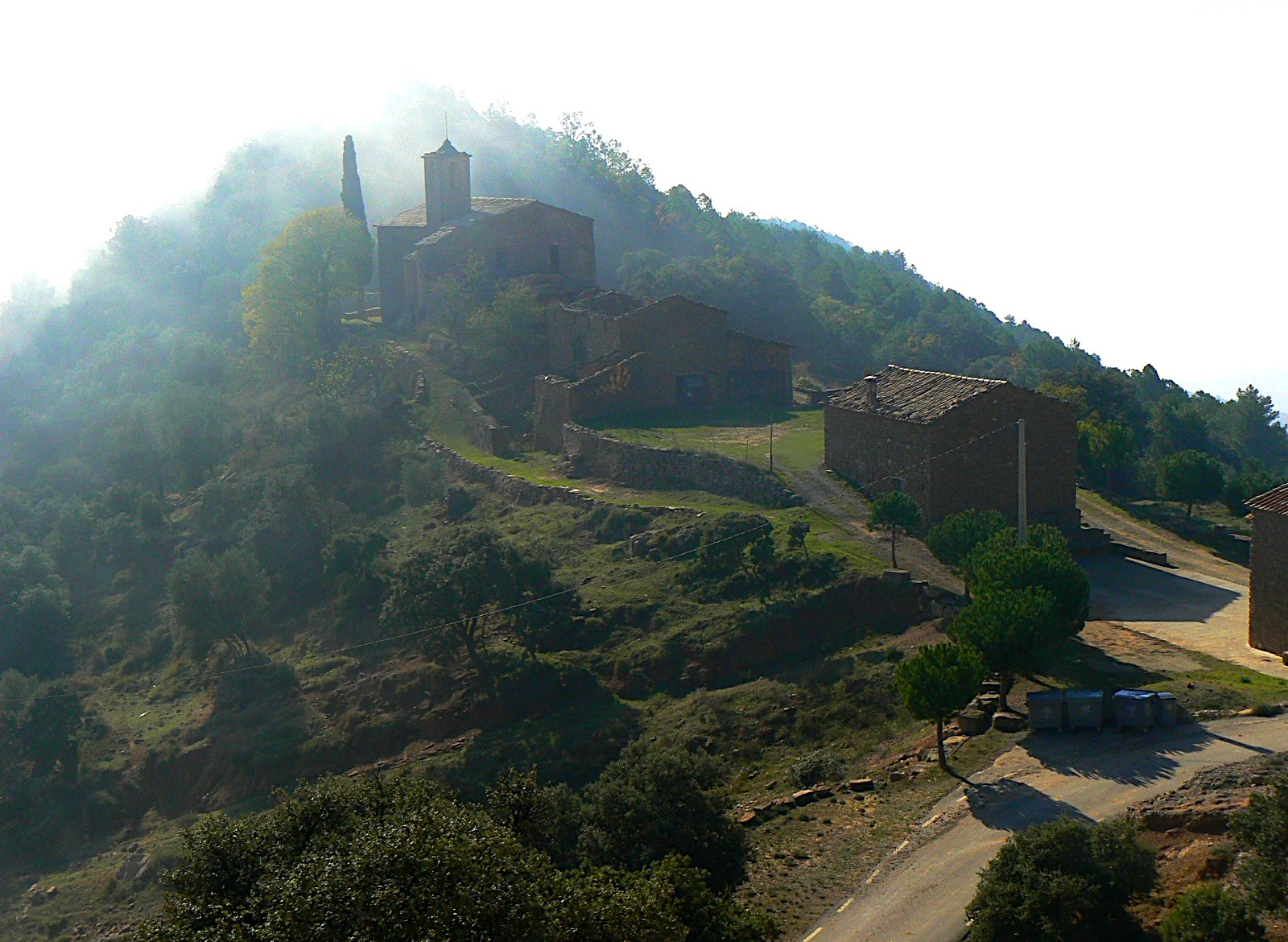 Poble de Pallerols de Rialb (La Baronia de Rialb, Catalunya). A primer pla l'antiga escola, seguit de la rectoria i l'església de Sant Esteve (del Romànic del s. XI)